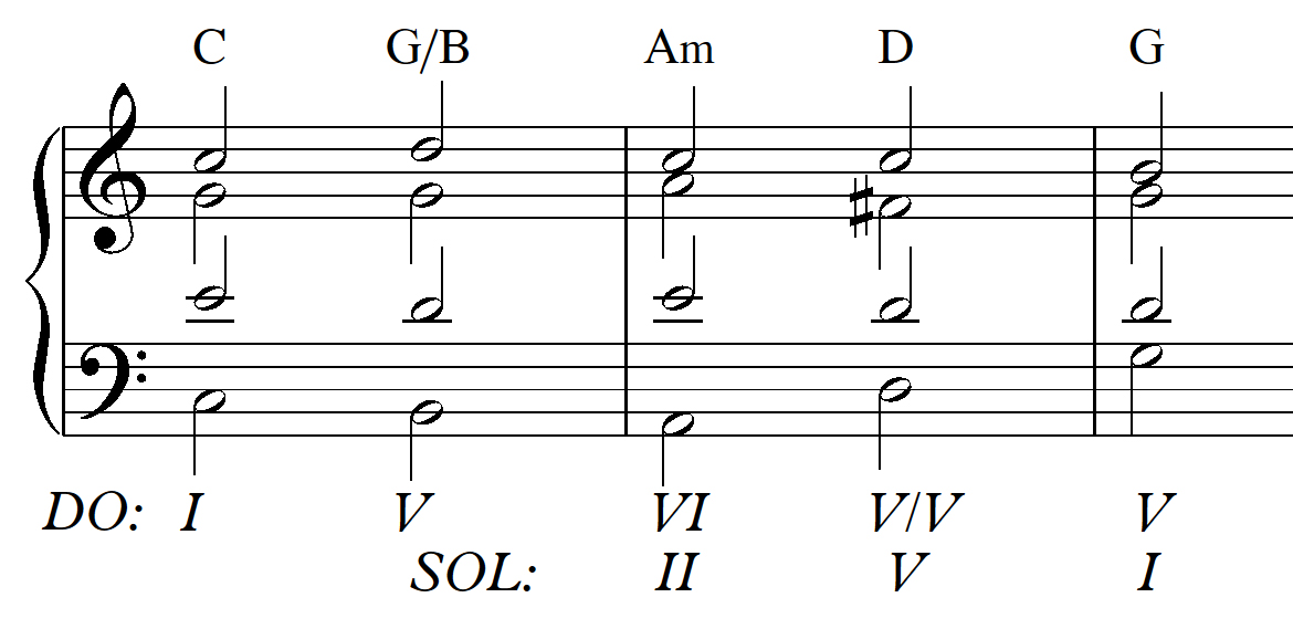 Ejemplo armónico del uso de Dominantes Secundarias y su preparación